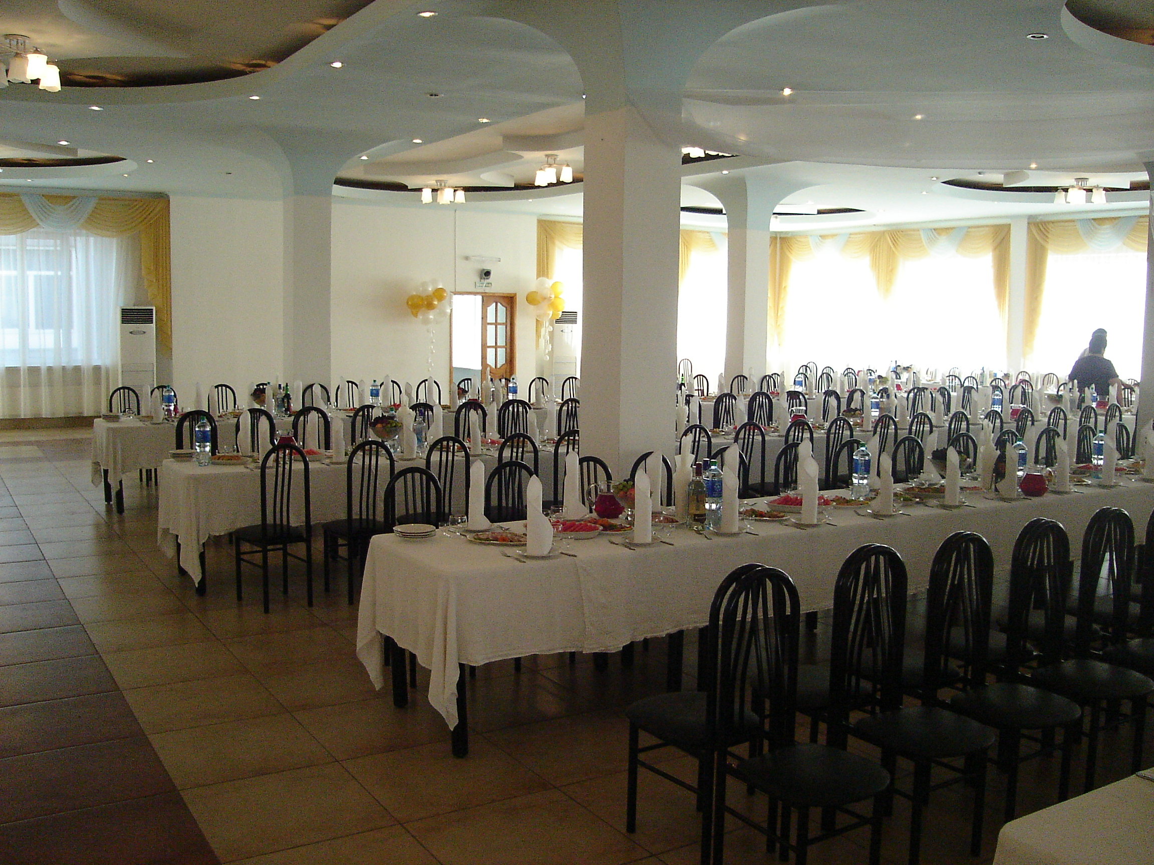 Бурятский государственный университет